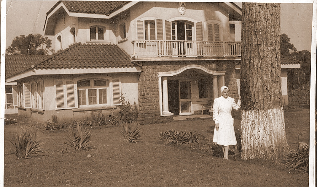 La Dra. Marta Teodora Schwarz en los jardines del Hospital SAMIC de Puerto Iguazú, entonces era la Directora del Hospital que hoy lleva su nombre.